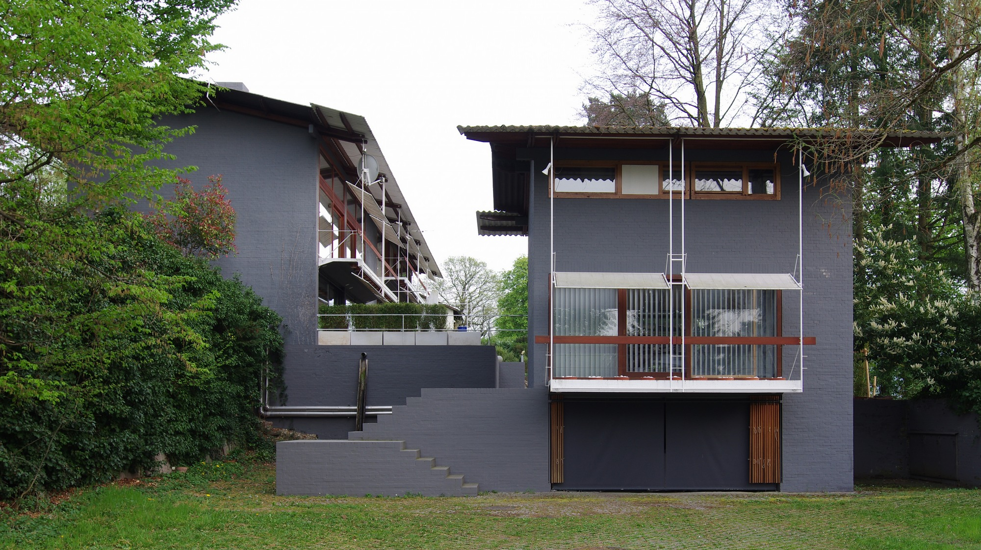 Das eigene Wohnhaus des Architekten Egon Eiermann am Krippenhof in Baden-Baden, gebaut 1959-1962.